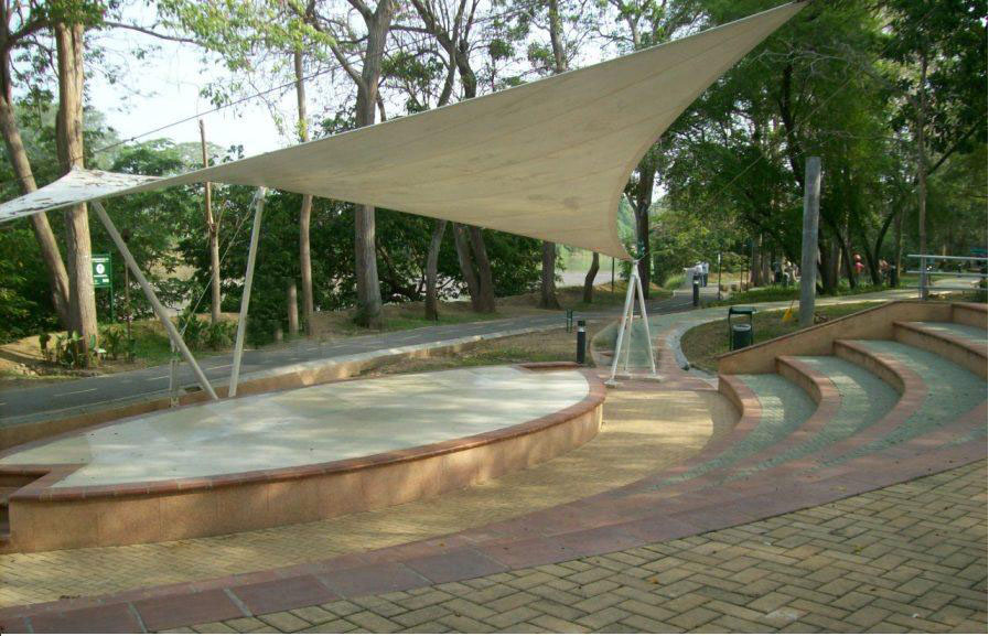 Teatro al aire libre en La Ronda del Sinú